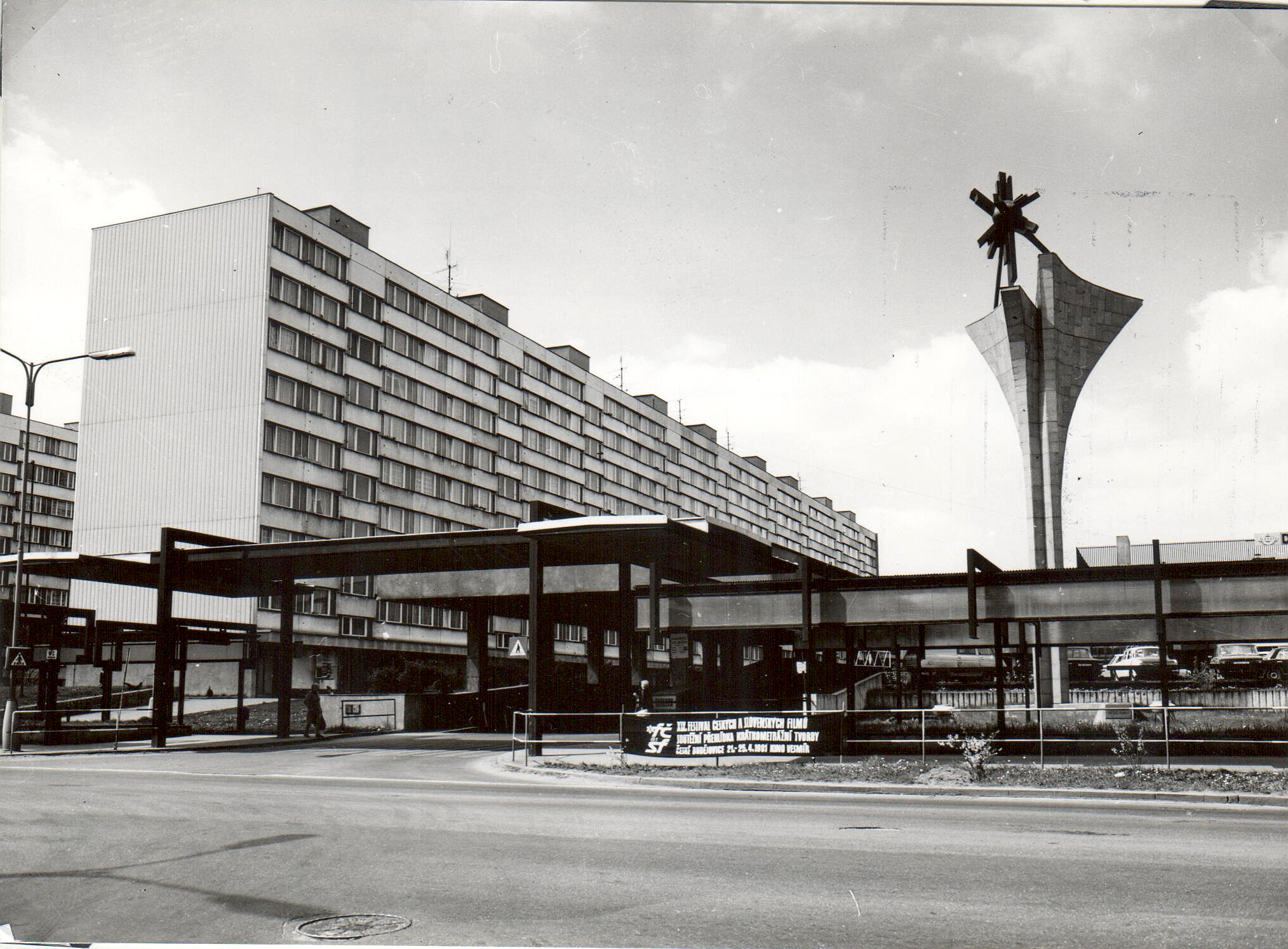 Obchodní dům Družba - pohled z ulice Strakonická